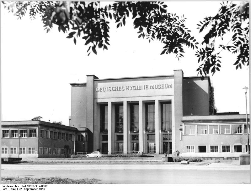 Dresden, Deutsche Hygiene-Museum ADN-ZB Löwe 22.9.1959 Dresden: Das Deutsche Hygiene-Museum. (siehe auch 67419-1N Gegenüberstellung)